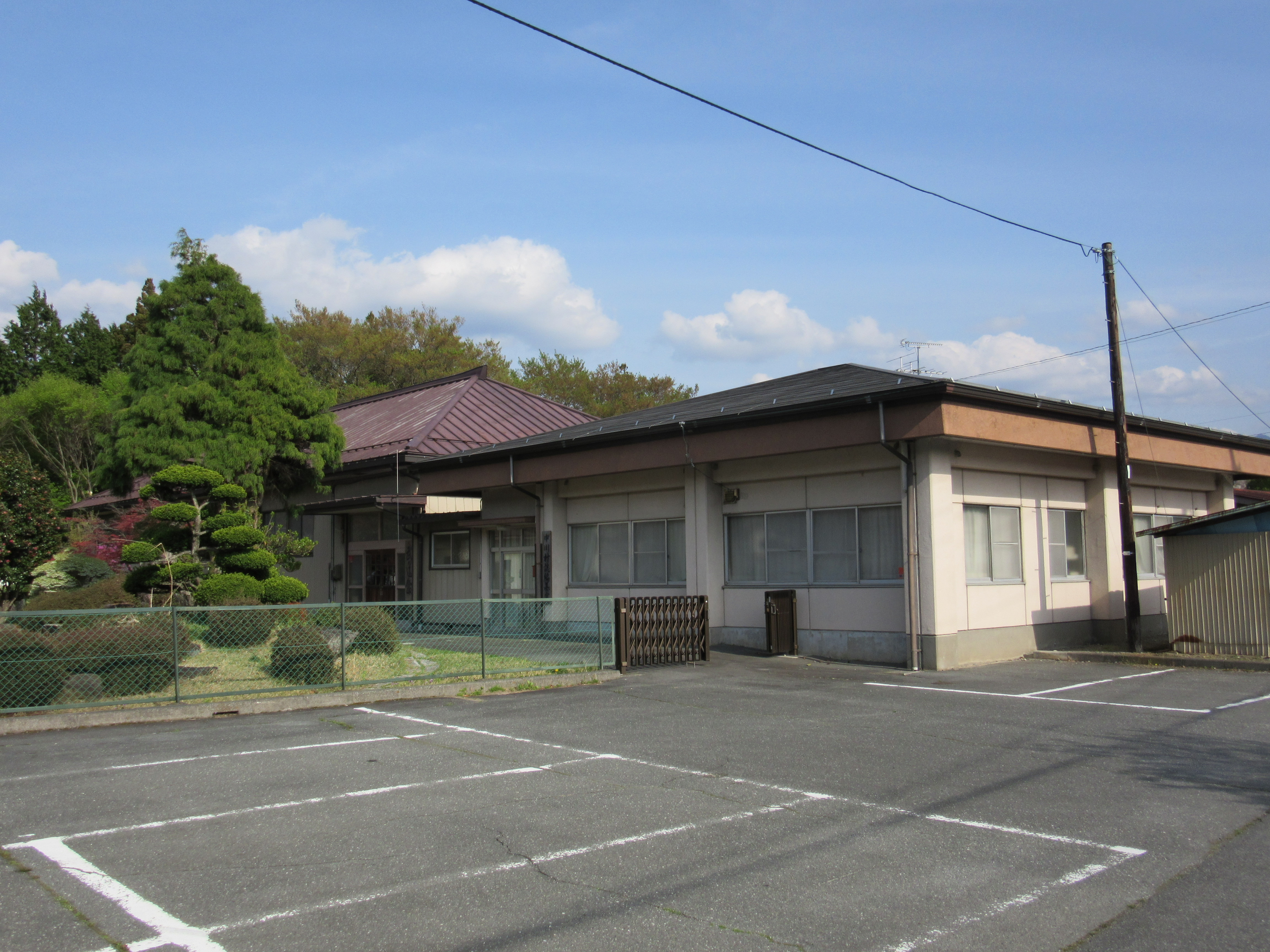 中川村武道館・村史編纂室